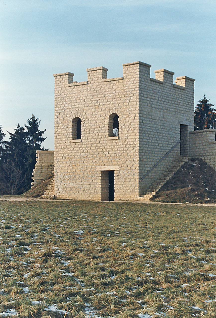 Kastell Pfünz, Bayern: Idealtypischer Rekonstruktionsversuch des nordwestlichen Eckturms. In der Antike könnte der Turm durchaus auch mit einem Dach ausgestattet gewesen sein. Zustand im Januar 1993.